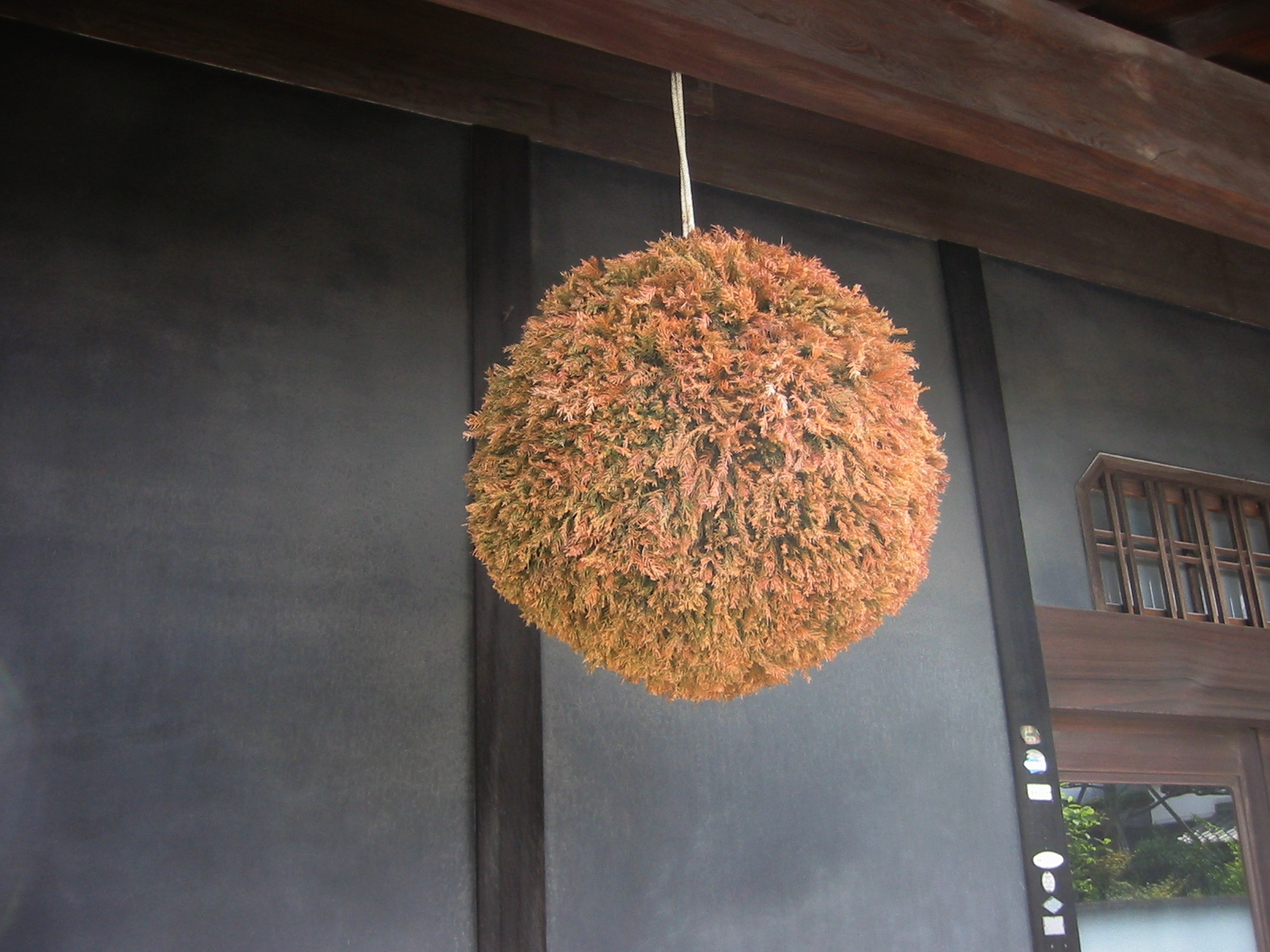 姫路広畑 西宮酒店の 杉玉。